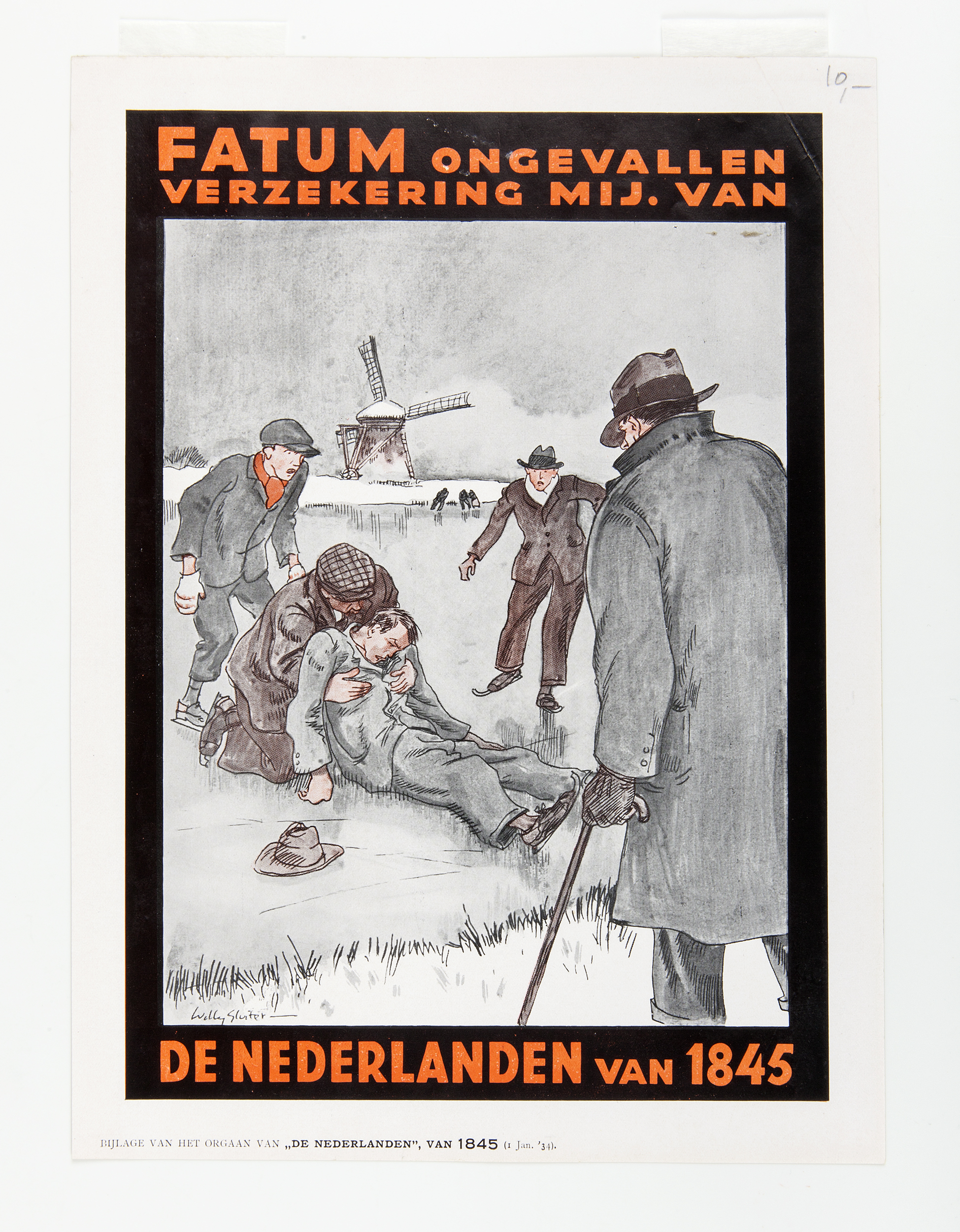 Dit affiche uit 1934 vormde de bijlage van het orgaan van de verzekeringmaatschappij ‘De Nederlanden’. Op de afbeelding is een gevallen man op het ijs te zien die wordt geholpen door omstanders. Het ontwerp is van Willy Sluiter. De tekst luidt: ‘FATUM ongevallen verzekering mij. van DE NEDERLANDEN van 1845’.